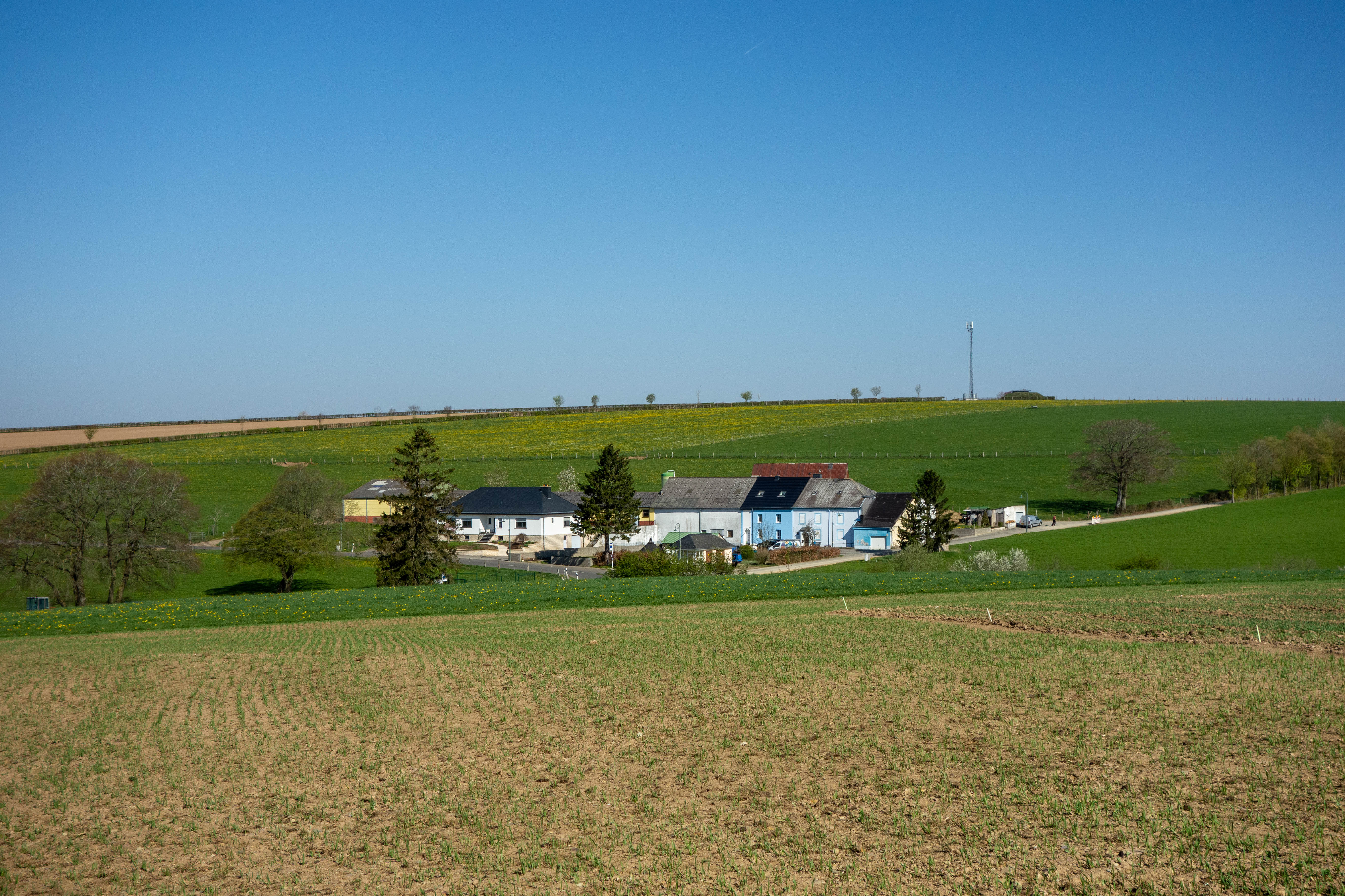 Vue op de Kéisfuert